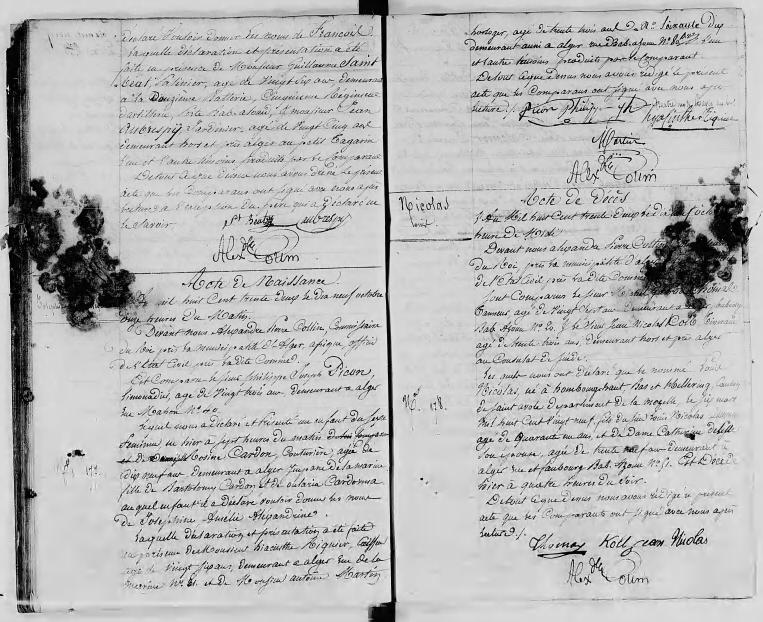 Premier acte de naissance (identifiable) dressé en Algérie française. La petite Joséphine Amélie Alexandrine Cardon est née le 18 octobre 1832 à Alger à 7 heures du matin, fille de Rosine Cardon et de père inconnu ; elle est le premier colon français d'Algérie connu à l'état civil. Elle décède moins de deux ans plus tard, le 7 juillet 1834 à 10 heures du matin. Une petite soeur est née en avril de la même année.